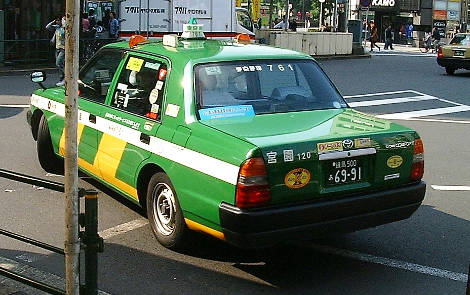 Miyazono taxi.